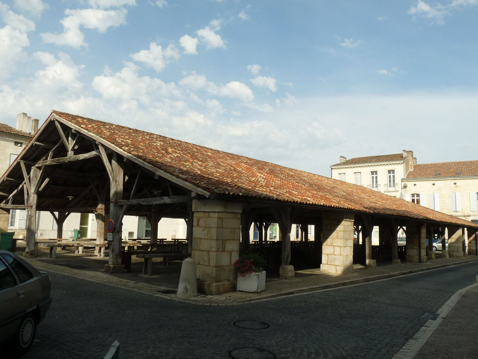 halles de Cozes (17), France